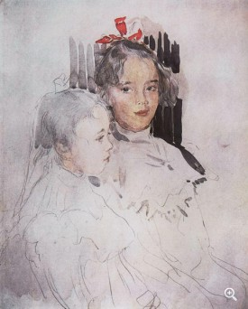 Портрет детей С. С. Боткина. 1900